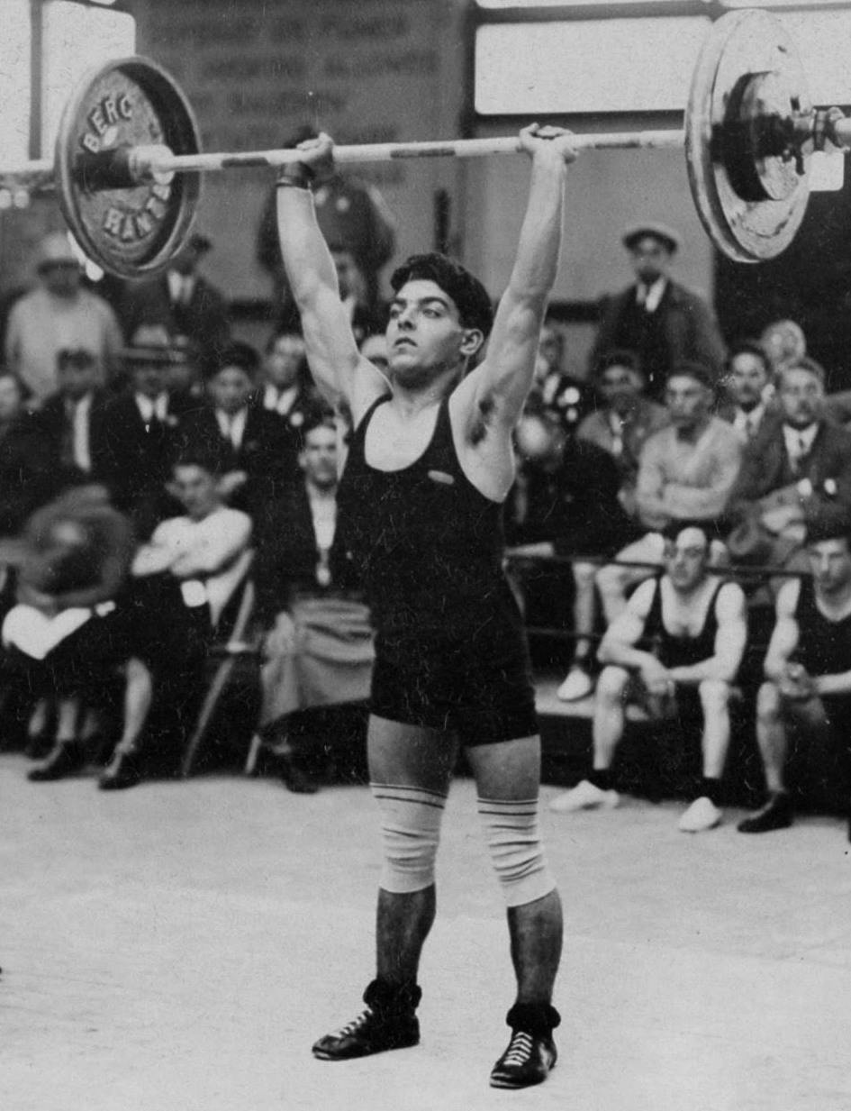 Sport. Sport, Olympische Spelen 1928, Amsterdam : De Belgische gewichtheffer Renier in actie.